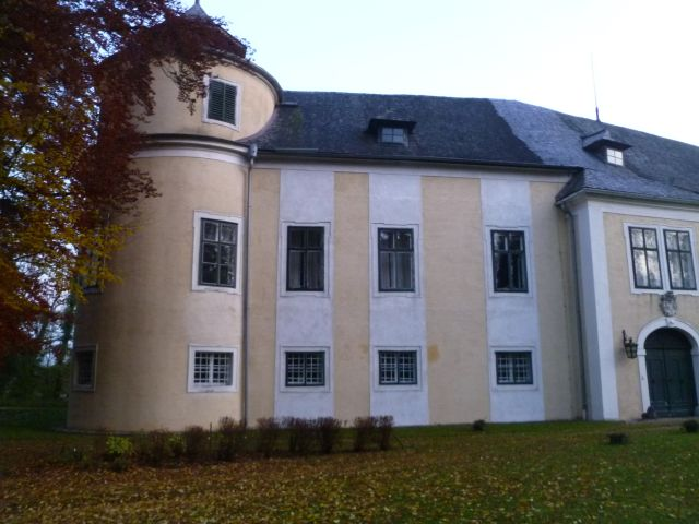 Schloss Wimsbach heute